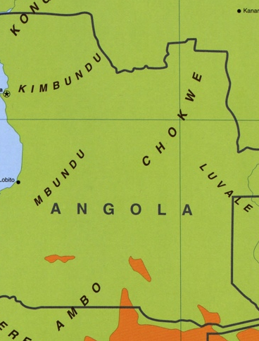 чокве